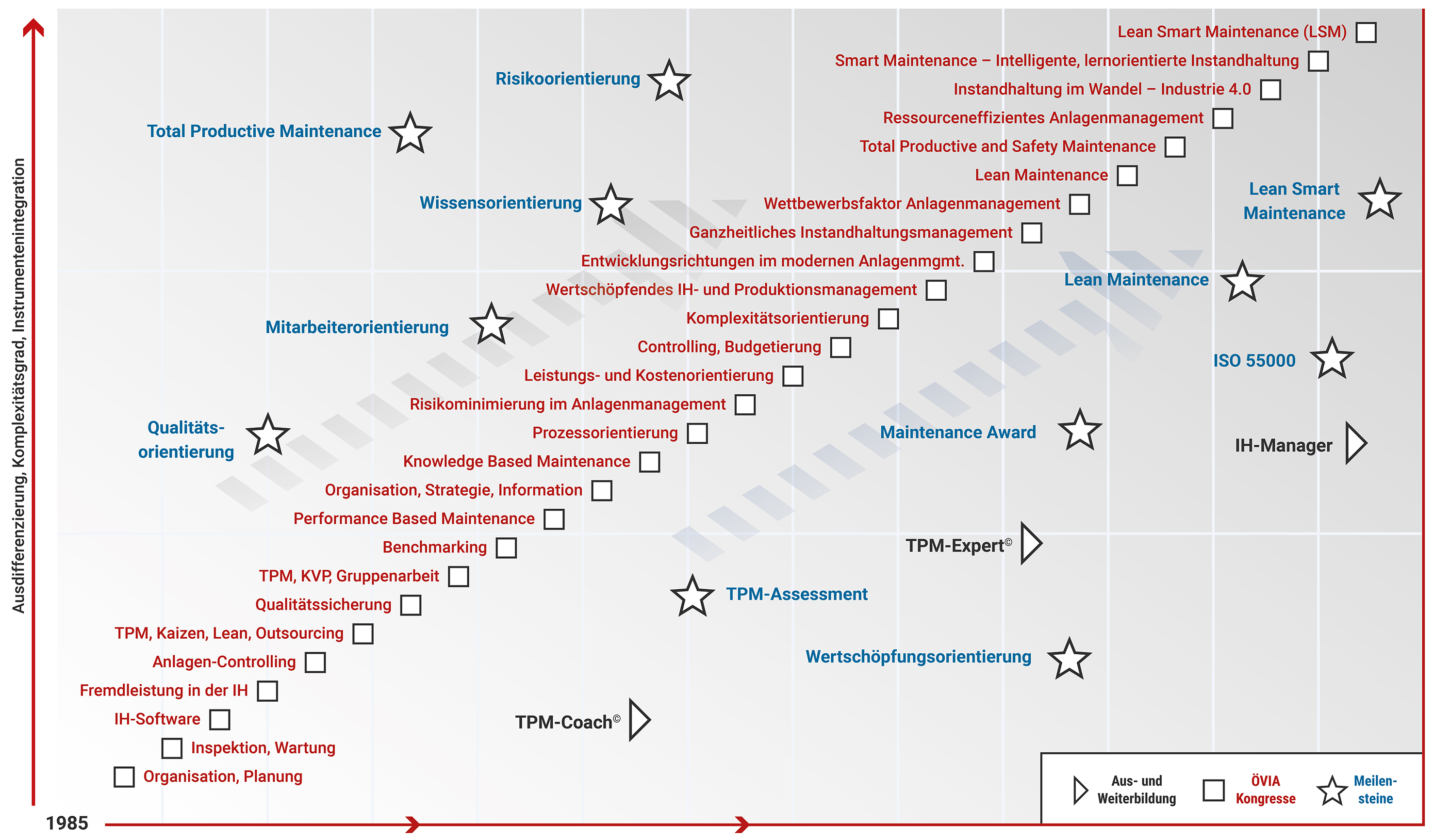 Die Abbidlung ist eine Darstellung von Kongressen, Meilensteinen sowie Aus- und Weiterbildungsangebote der ÖVIA im zeitlichen Verlauf.